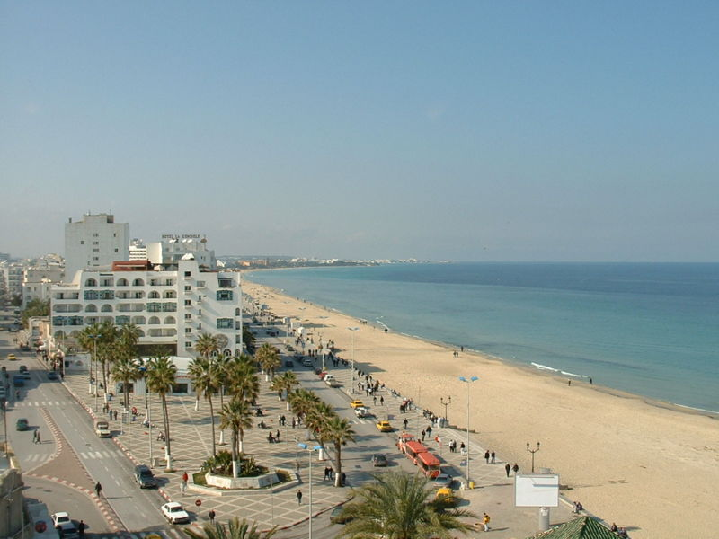 Photographie de la plage de Sousse, prise depuis l'hôtel Abou Nawas Bou Jafaar